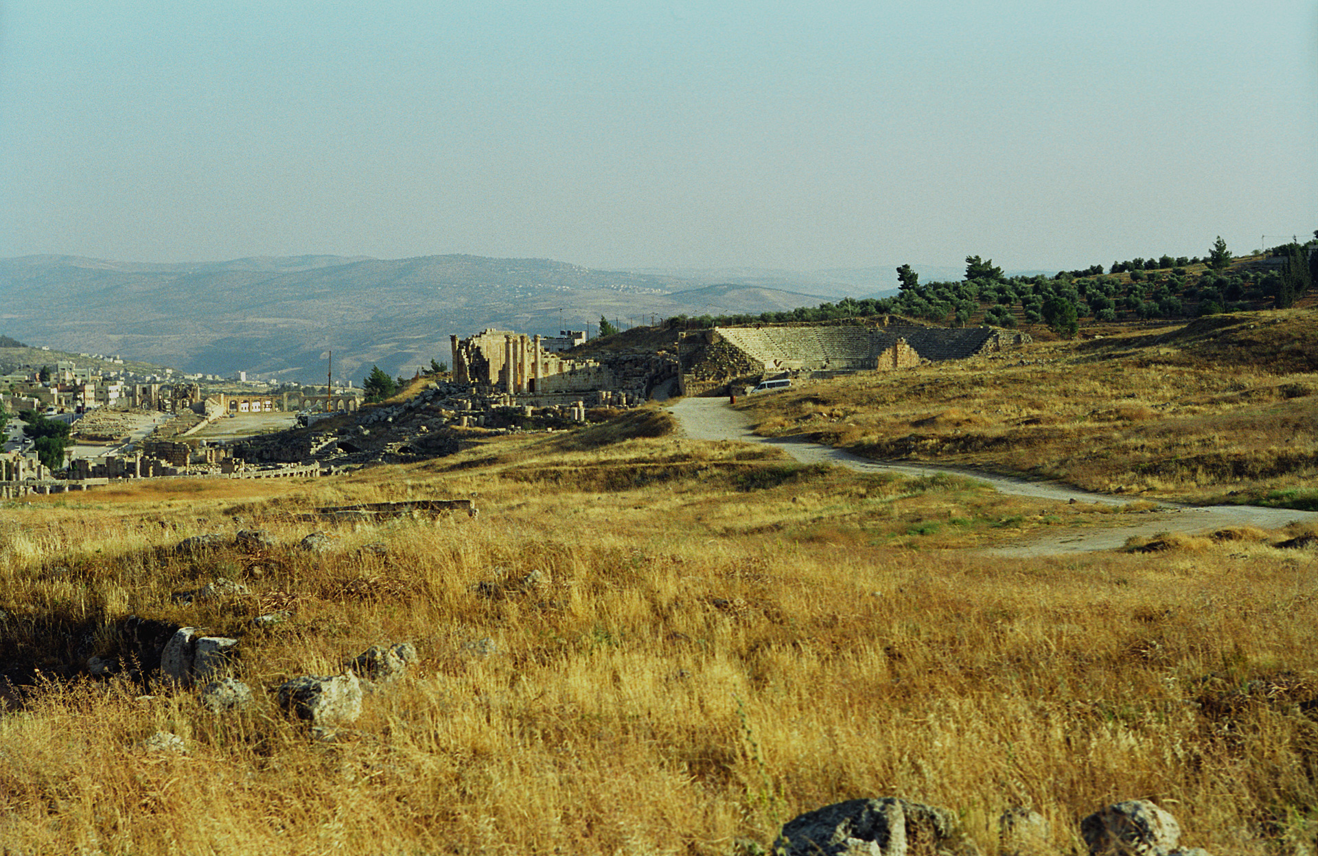 Jerash, Jordan